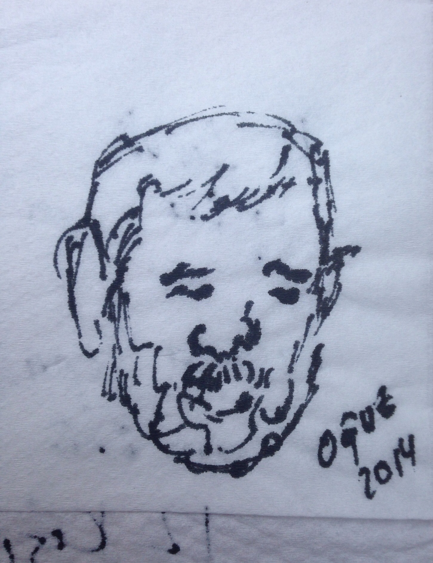 Ahmet Telli ile yemekte iken peçeteye benim çizdiğim çalışma. Orijinali Ahmet Telii'nin kendisinde.